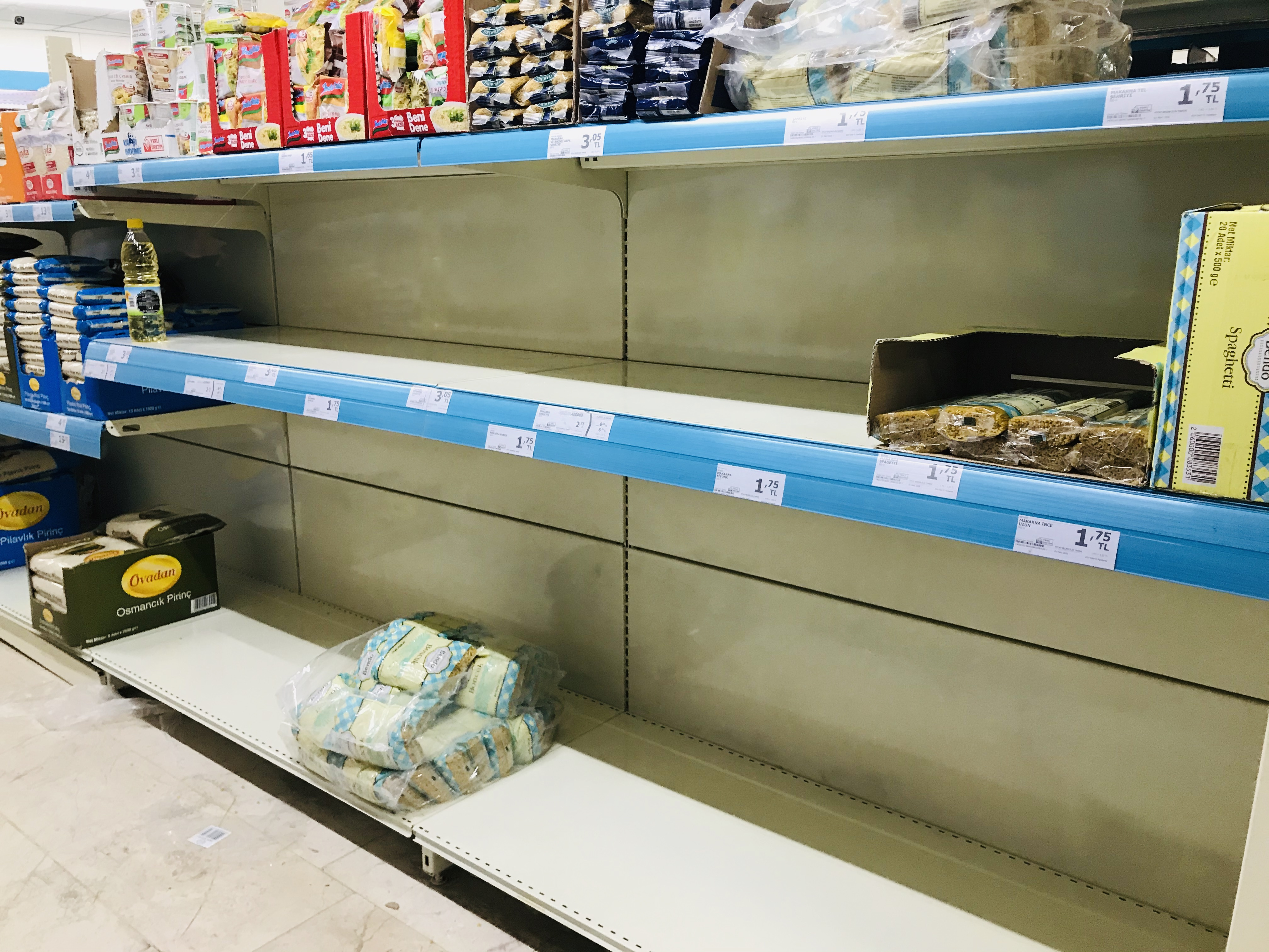 Türkiye, İstanbul'da bir süpermarkette boş makarna rafı